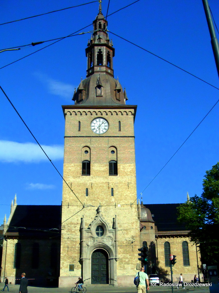 Wieża katedralna w Oslo.